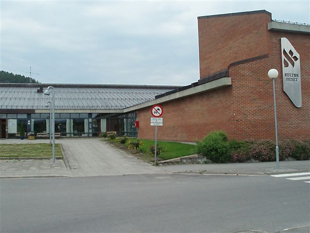 Namsos Kulturhus, Norway